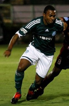 Willian em ação no Palmeiras em 2010